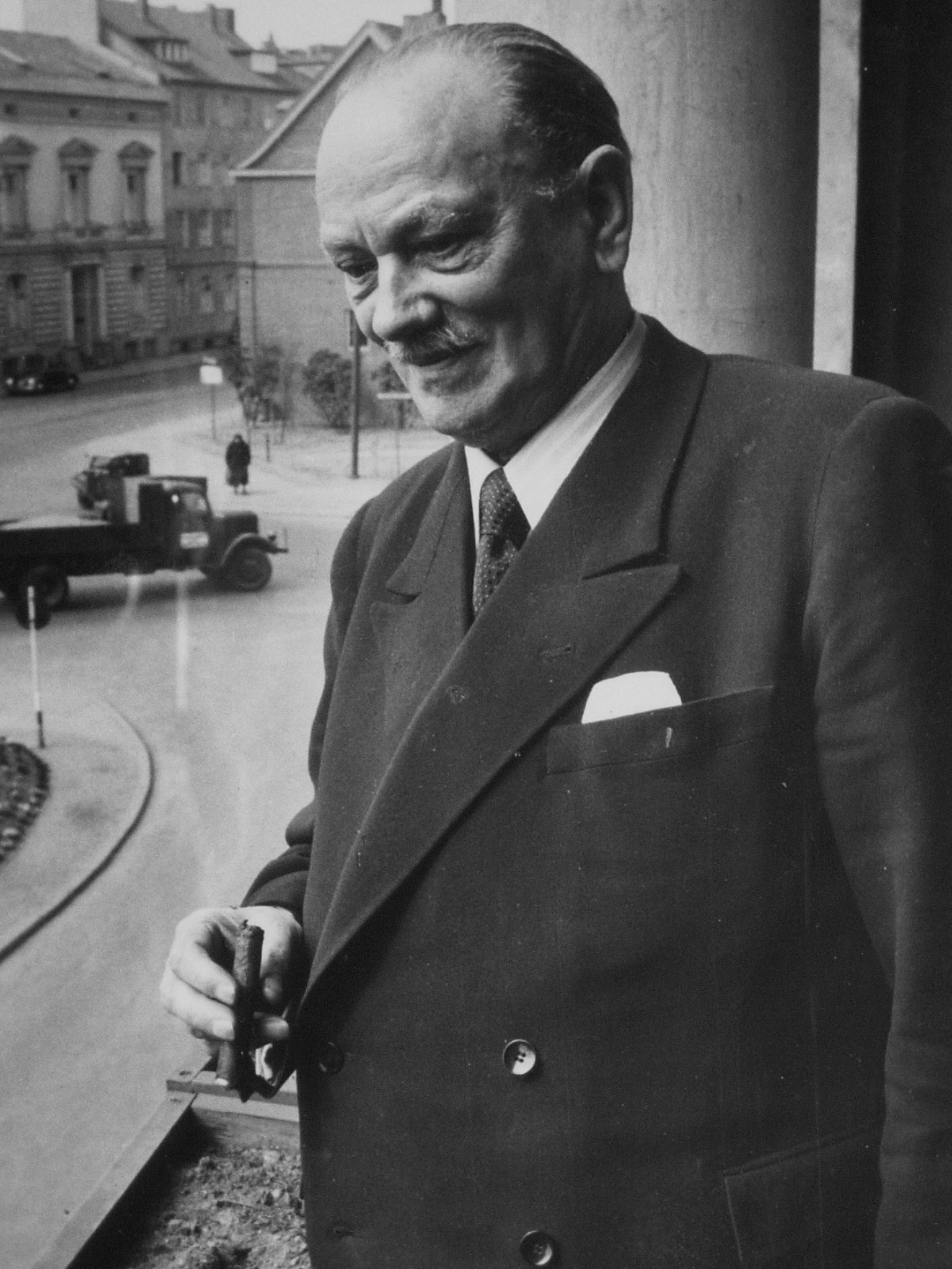 August Kirch in Privatwohnung